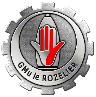 Héraldique Croissant de lune montant d’argent fermé, bordé d’une roue crénelée d’argent sur douze dents d’engrenages, accompagné en son abîme d’un obus d’artillerie chargé à la main de Fatma de gueules et d’argent Symbole Le croissant de lune est un symbole important dans l’Islam, il symbolise le temps à travers les différents cycles de la lune mais est aussi un signe de résurrection. « Le croissant est à la fois ouvert et fermé, ouvert à l’éternité et pourtant limité dans le temps » . La main de Fatma est un symbole essentiellement répandu au Maghreb et, en Egypte elle représente dans la tradition Nord africaine une figure protectrice contre le « mauvais sort ». L’obus rappel bien entendu la vocation technique de l’unité, héritière de l’artillerie. Quant à la roue crénelée sur douze dents d’engrenages elle est bien entendu le symbole de la mécanique.